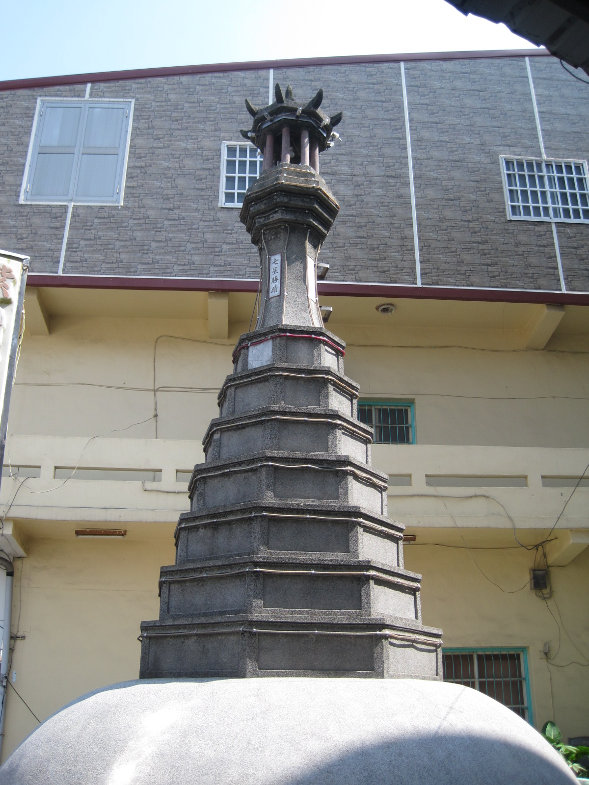 高雄市內門區「七星墜地」的七座七星塔之一。